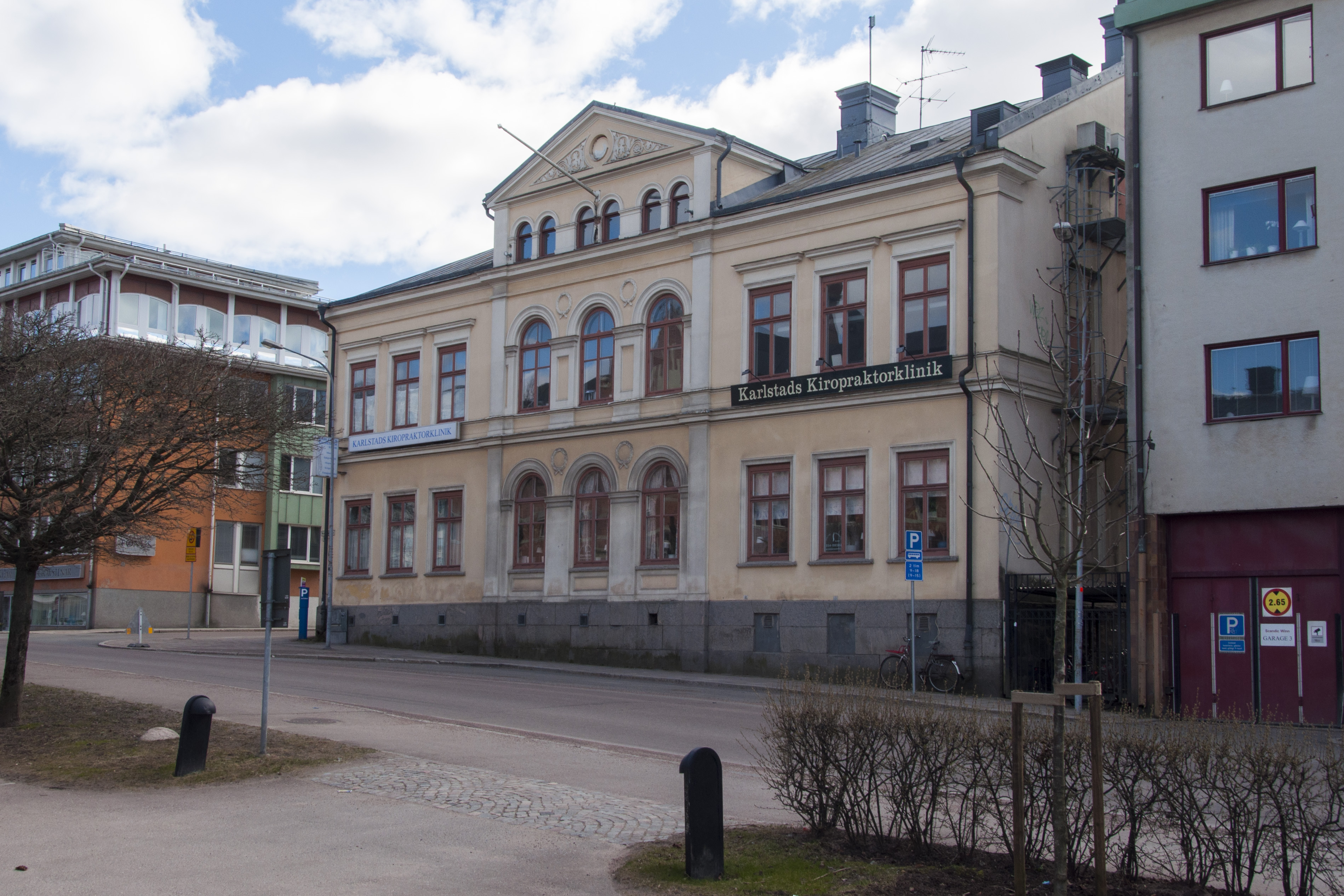 Norra skolan, Norra strandgatan 5, Karlstad. Tidigare flickskola. Byggnadsår 1877. Arkitekt Teodor Högström